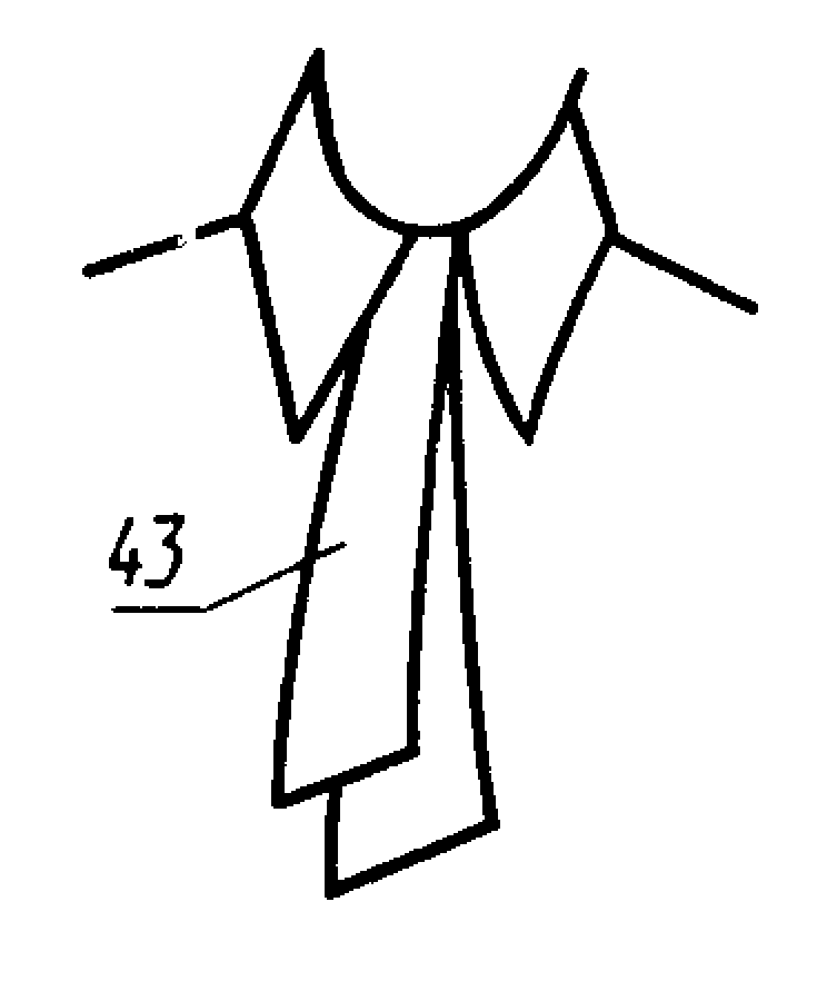 Изображение из ГОСТ 22977-89 (СТ СЭВ 6484-88) — Детали швейных изделий. Термины и определения.